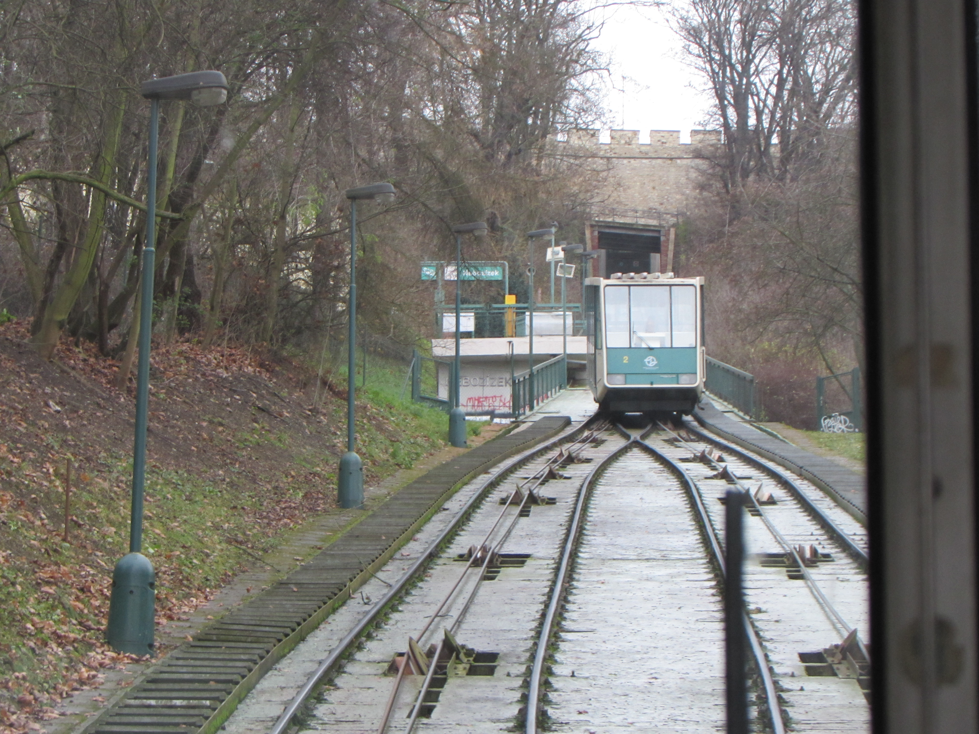 Vettura della Funicolare di Petrin in servizio